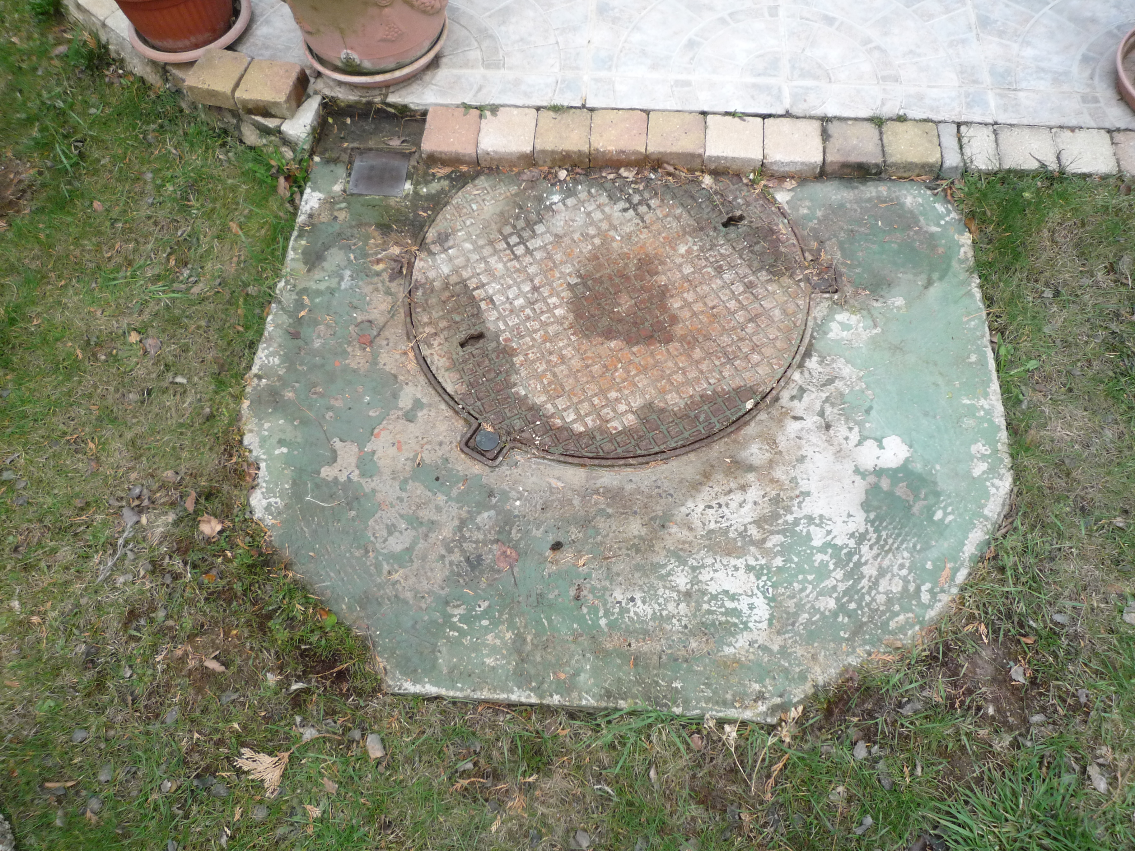 La Fosse Saint Édouard de la Compagnie des mines d'Azincourt était un charbonnage constitué d'un seul puits situé à Aniche, Nord, Nord-Pas-de-Calais, France.